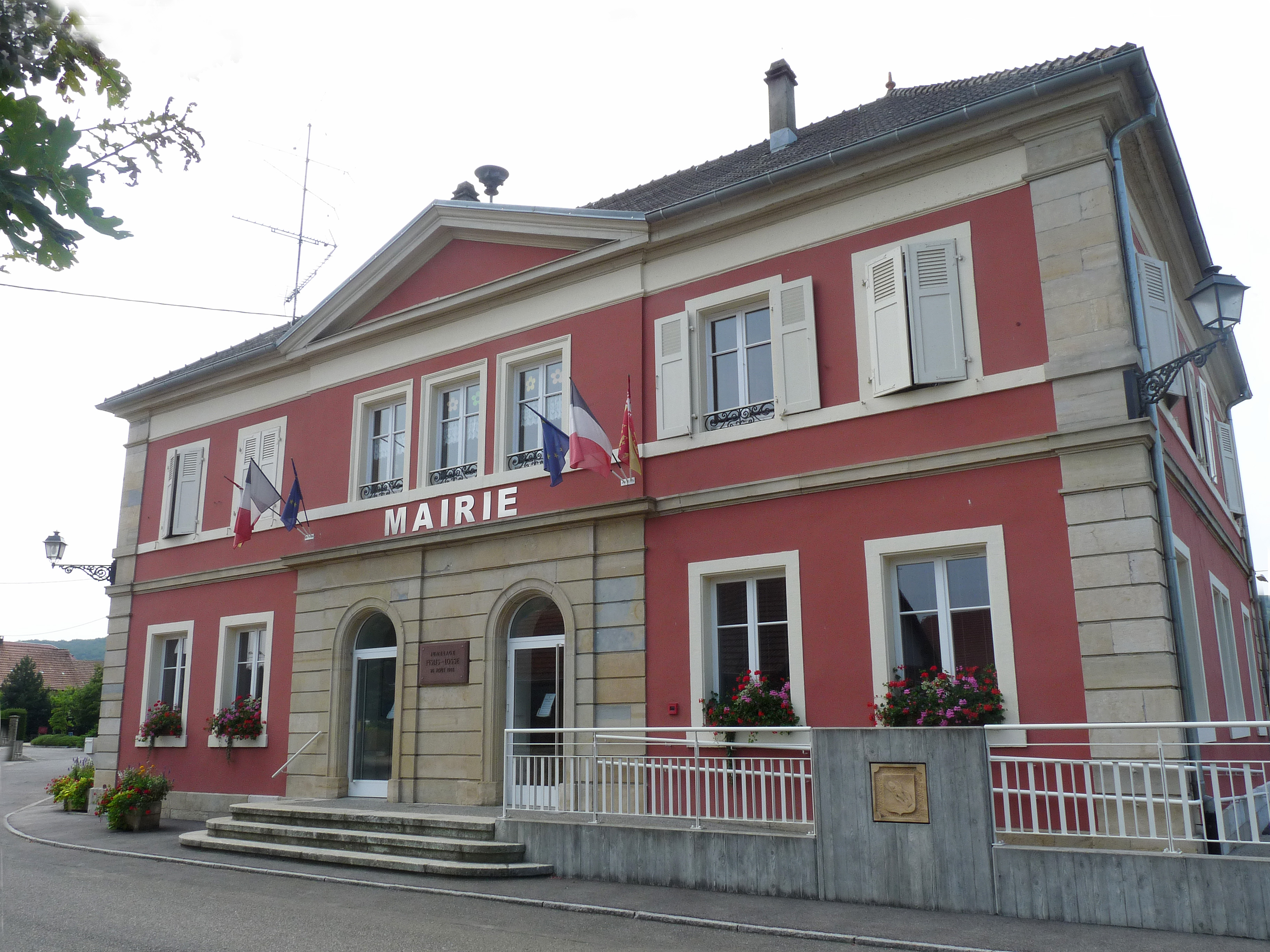 Fislis (Haut-Rhin) : mairie, ancienne mairie-école